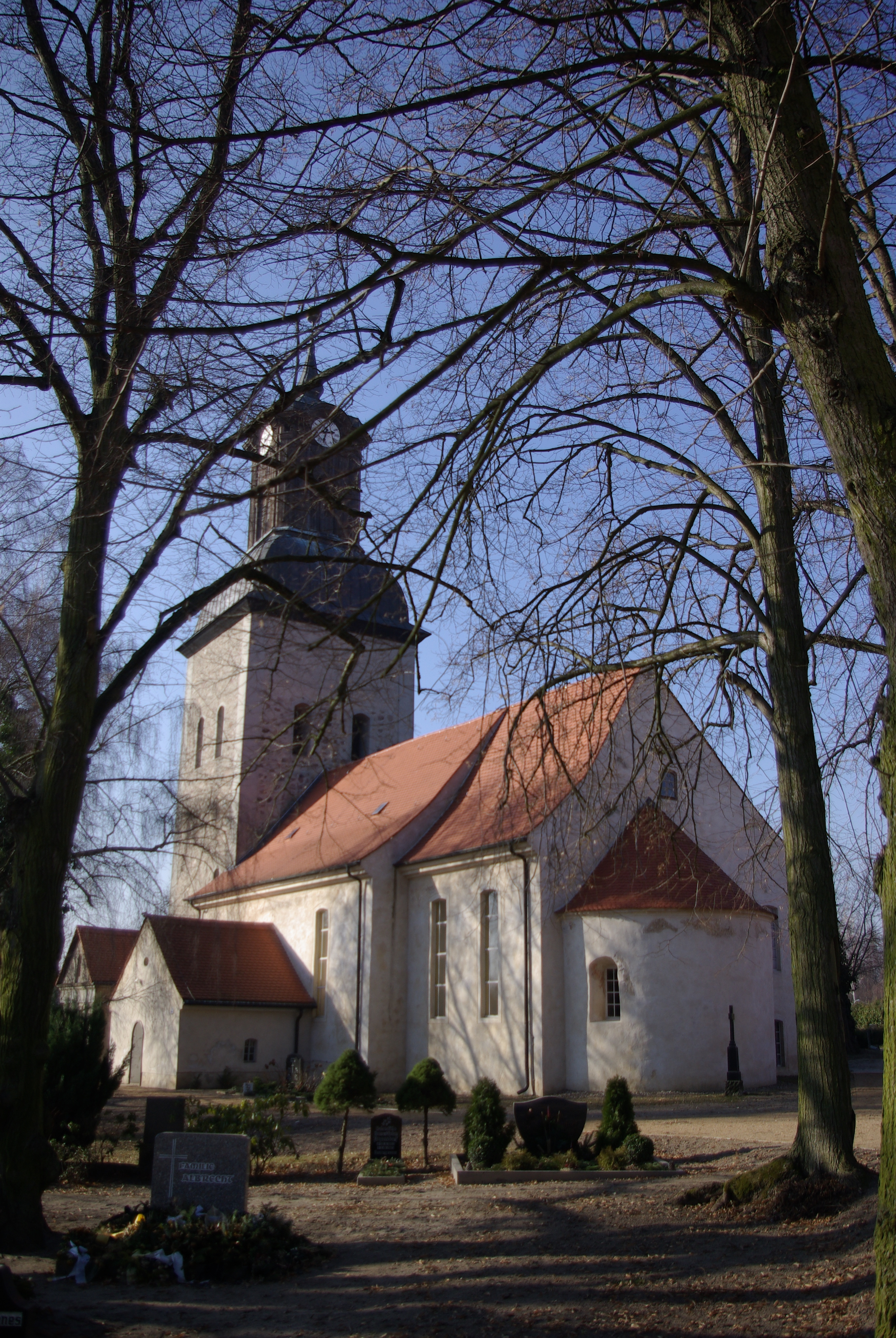 Steinhöfel, Ortsteil Heinersdorf in Brandenburg. Die Kirche in Heinersdorf steht unter Denkmalschutz.